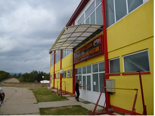 Училишната сала однадвор.